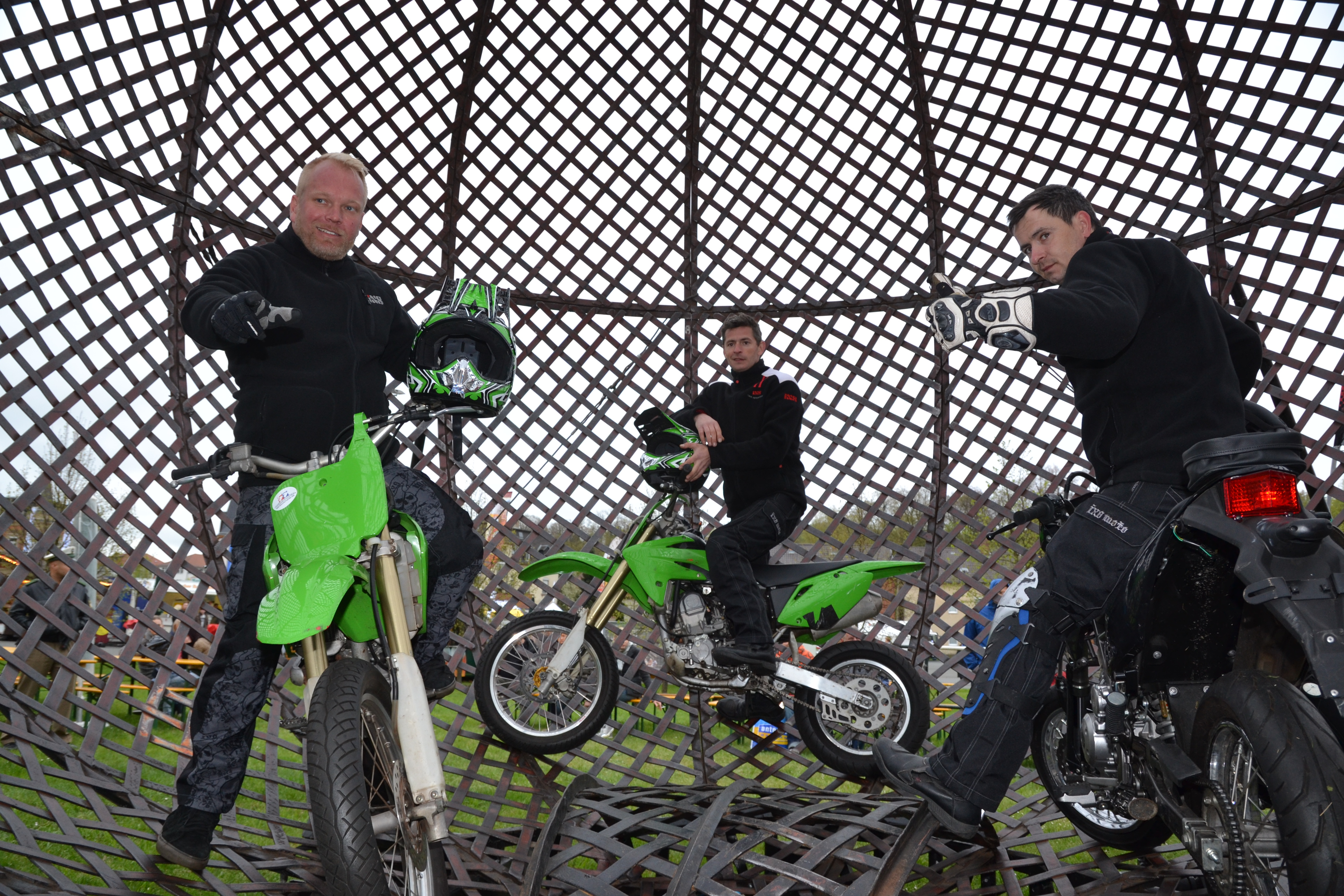 Nervenkitzel mit dem "Globe of Speed"